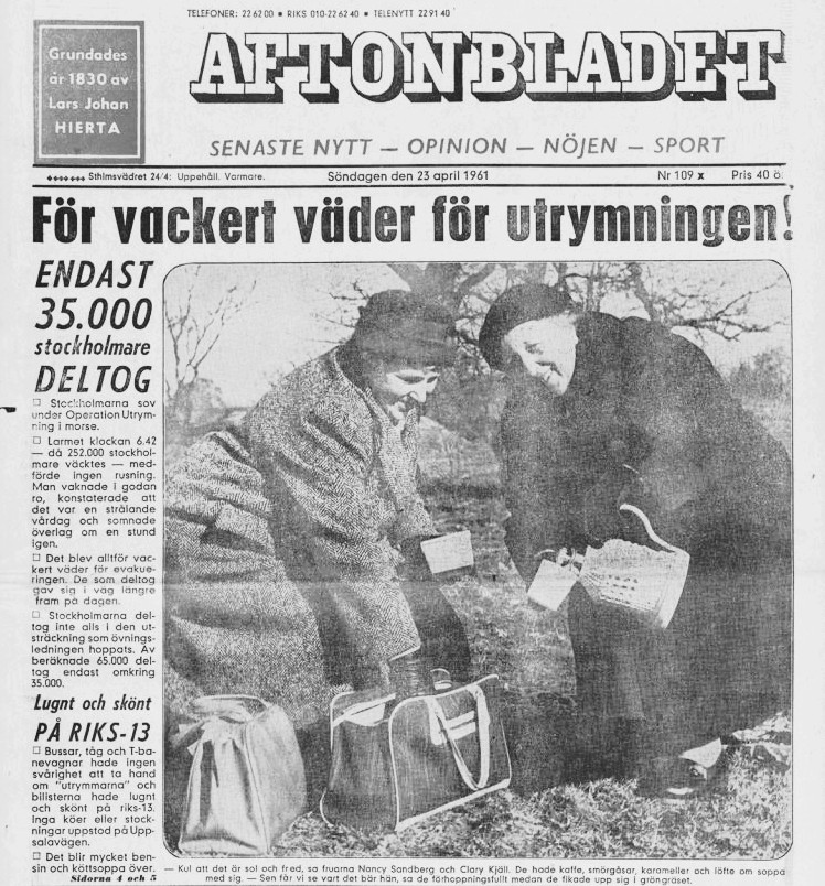 Aftonbladets rubrik i samband med "Operation Stockholm"